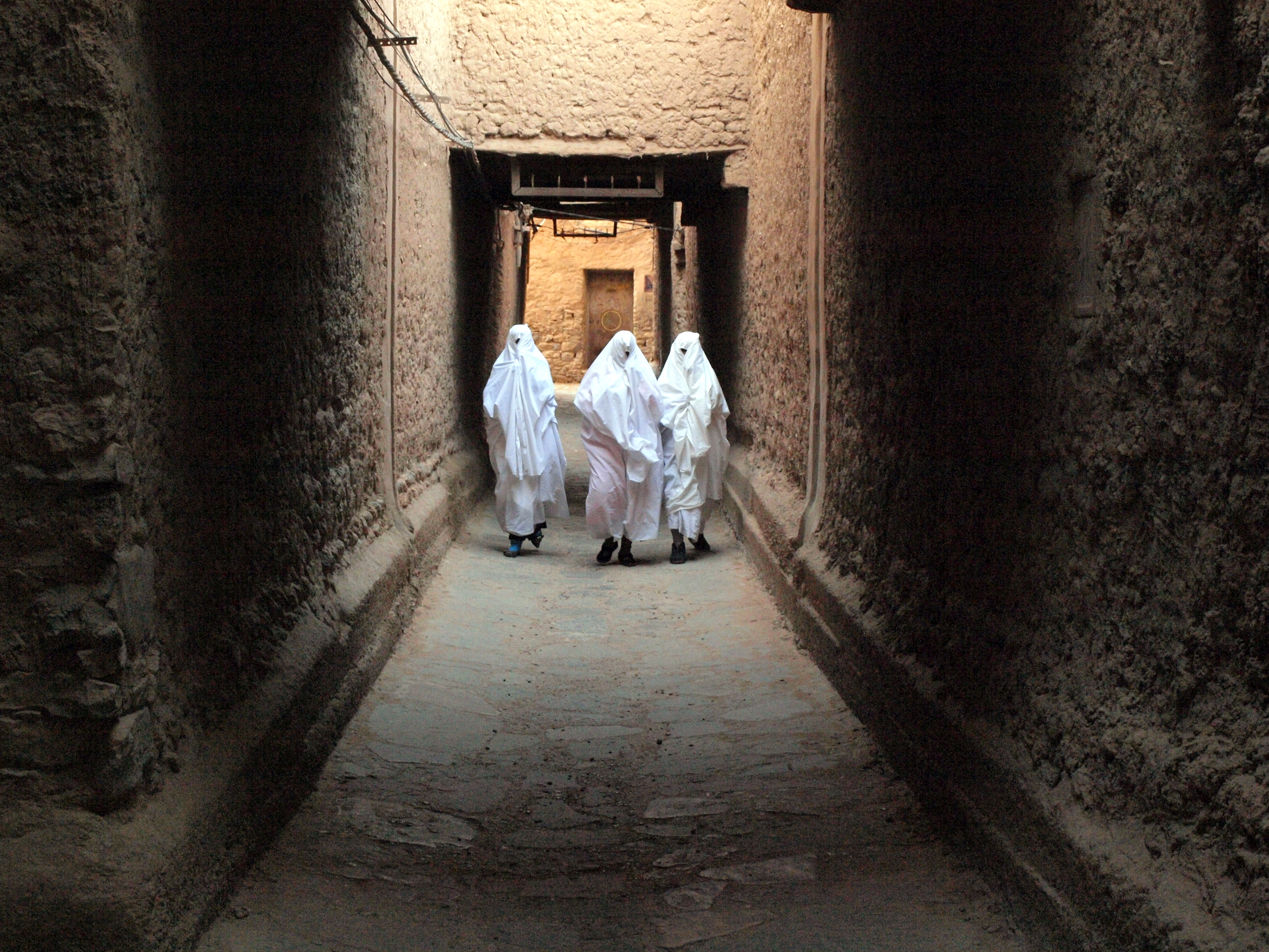 Moterys Figige